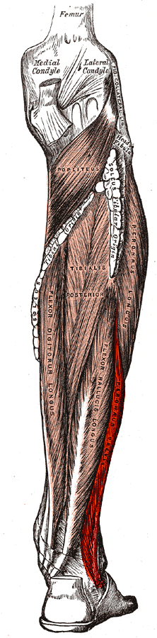 Peroneus brevis muscle